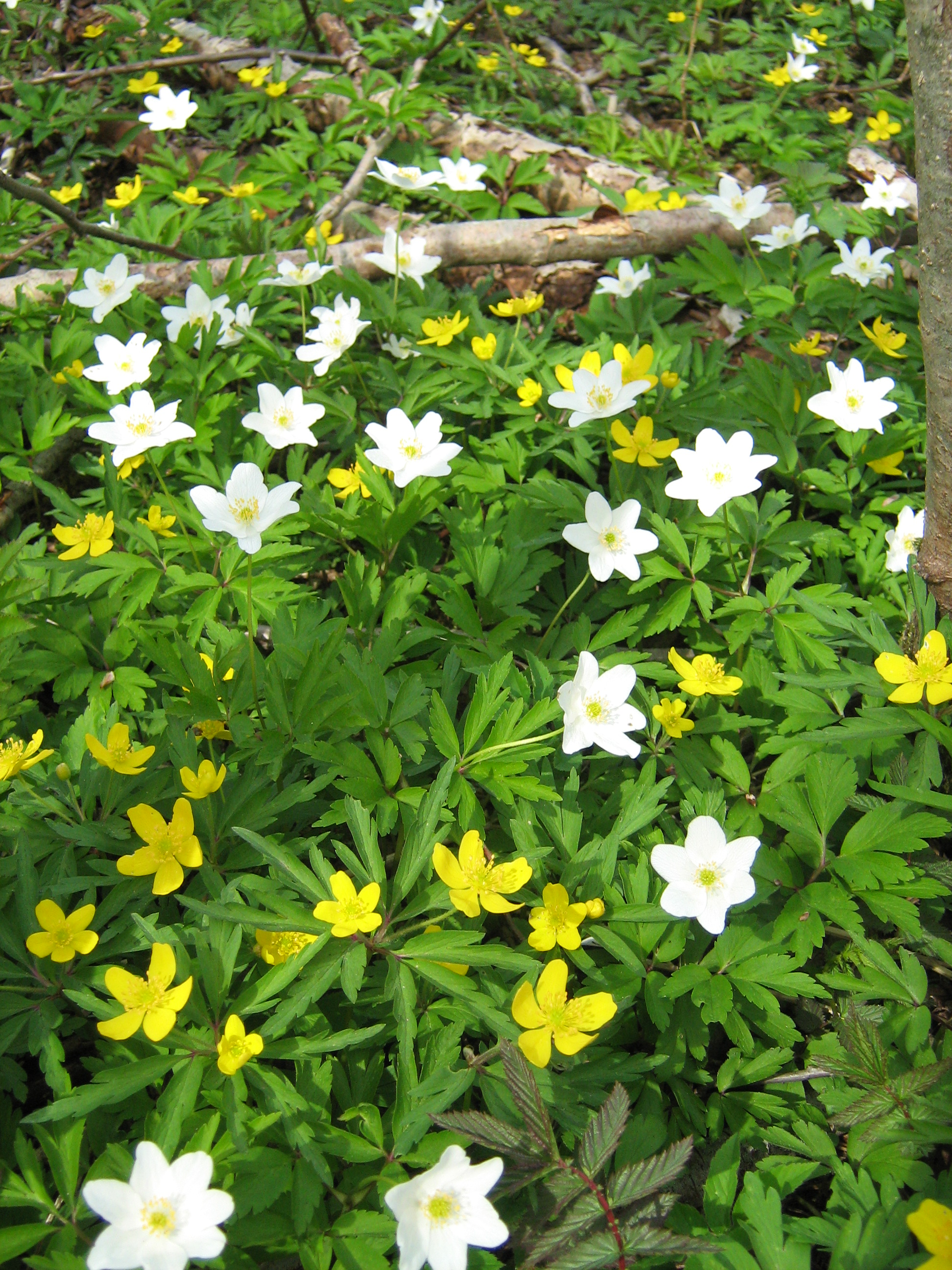 Pildil võsaülased (Anemone nemorosa) ja kollased ülased (Anemone ranunculoides). Pildistatud Nõva vallas Läänemaal.